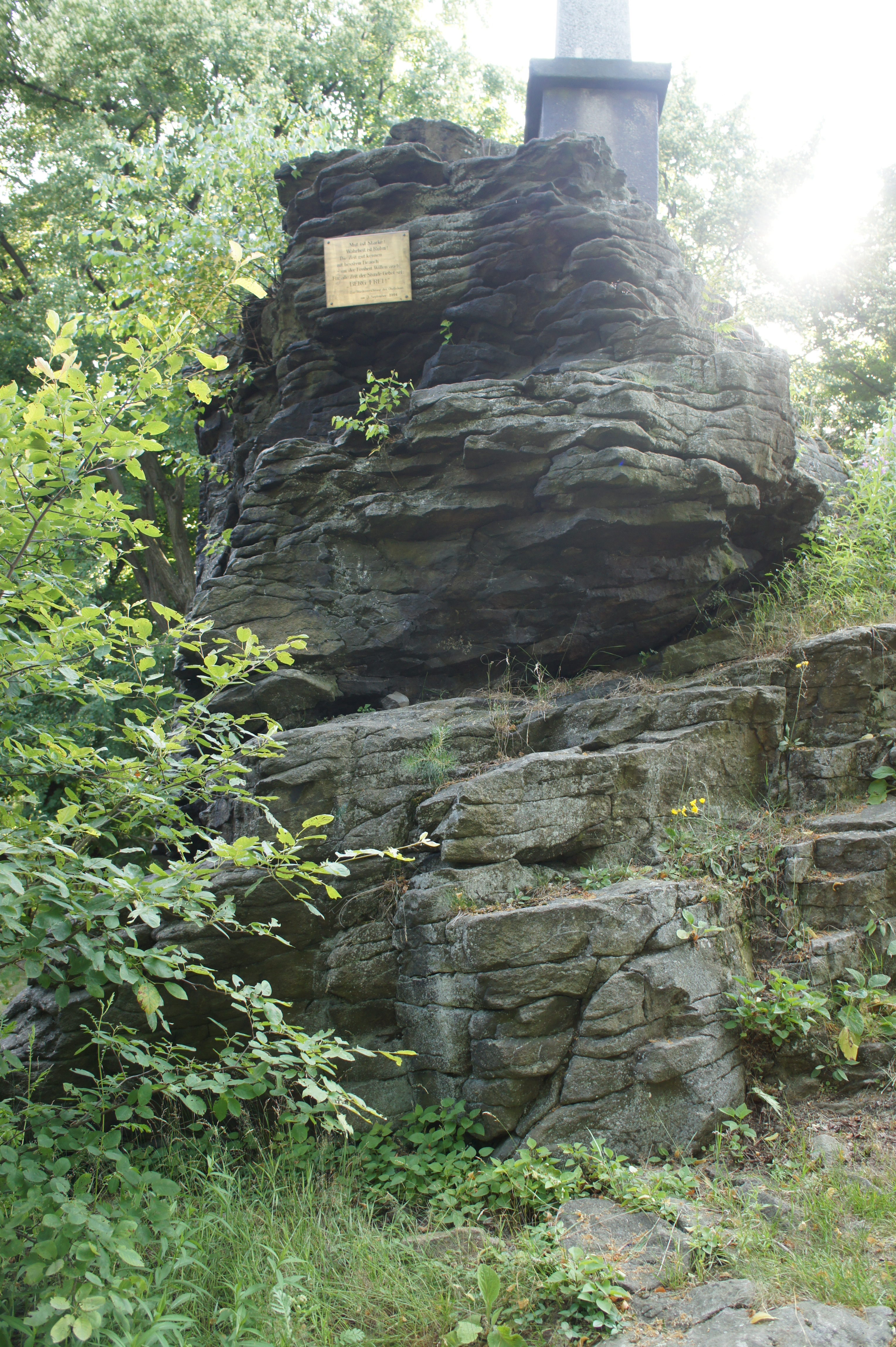 Keulenberg, 413 m hohe Erhebung in der Westlausitz und Wandergebiet. - Google Maps - Google Earth Tafel zur Wiedererrichtung des Obelisken 1994